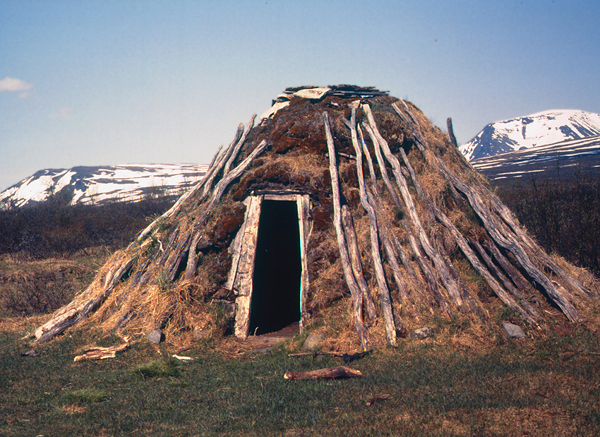 Samische Kåta in der Siedlung Pårek (Sareks Nationalpark)